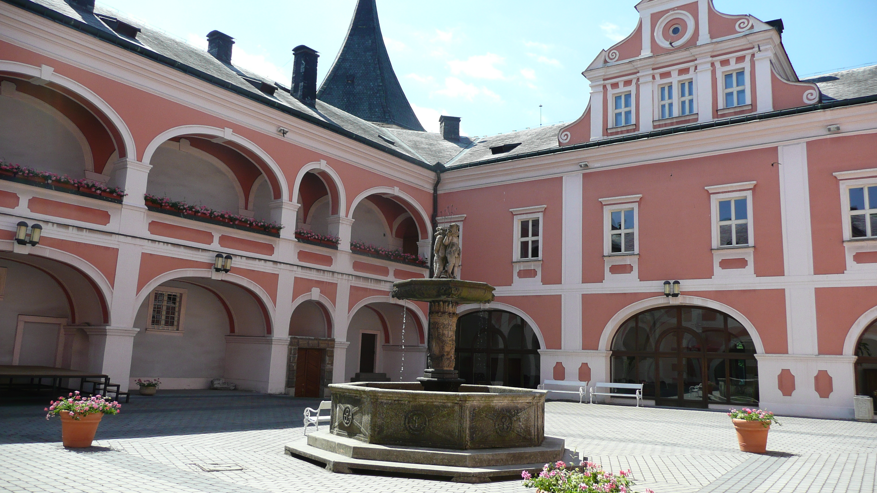 Nádvoří sokolovského zámku.